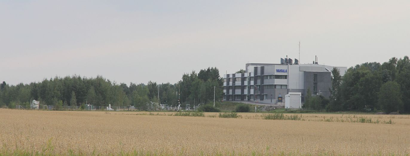 Vaisala Oy:n pääkonttoria, Vantaanlaakso, Vantaa. Huom: Muista säilyttää viittaus kuvaajaan, mikäli käytät kuvaa.